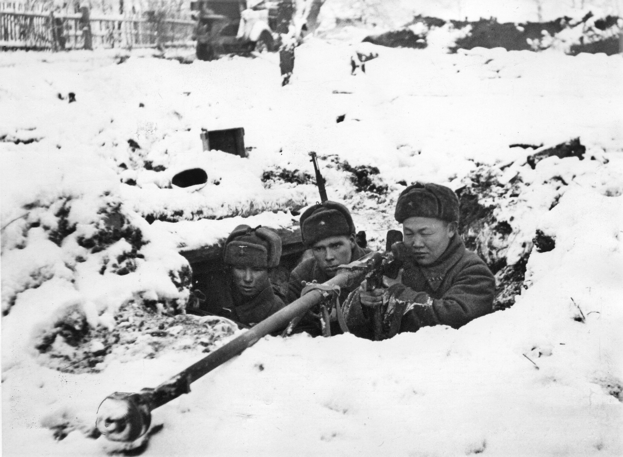 Расчёт советского противотанкового ружья ПТРД-41 на позиции во время битвы за Москву. Московская область, зима 1941 — 1942 гг. Источник: Государственный Зеленоградский историко-краеведческий музей.